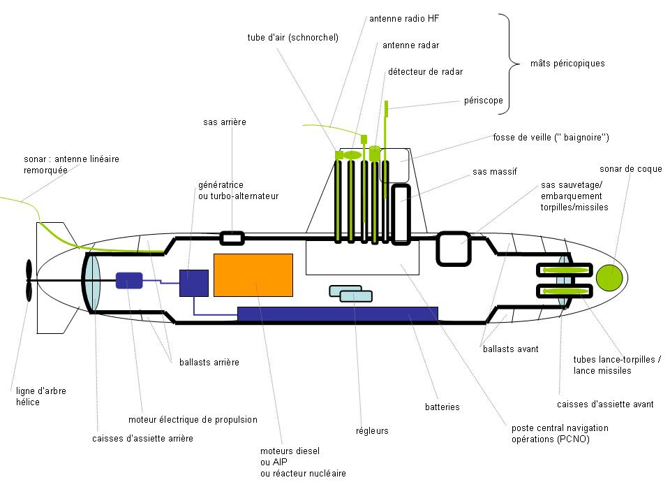 Schéma de principe d'un sous-marin author : New Dog